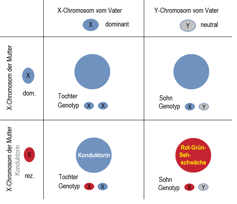 Vererbung der Rot-Grün-Sehschwäche